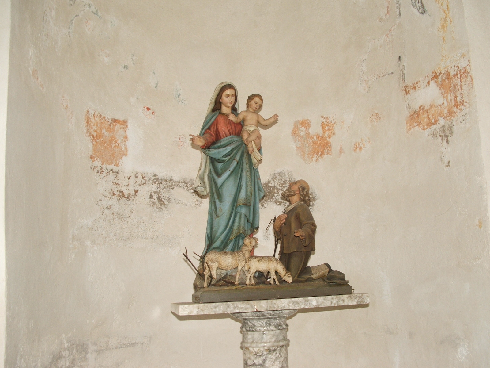 Camogli, Abbazia di San Fruttuoso. Fotoripresa autorizzata